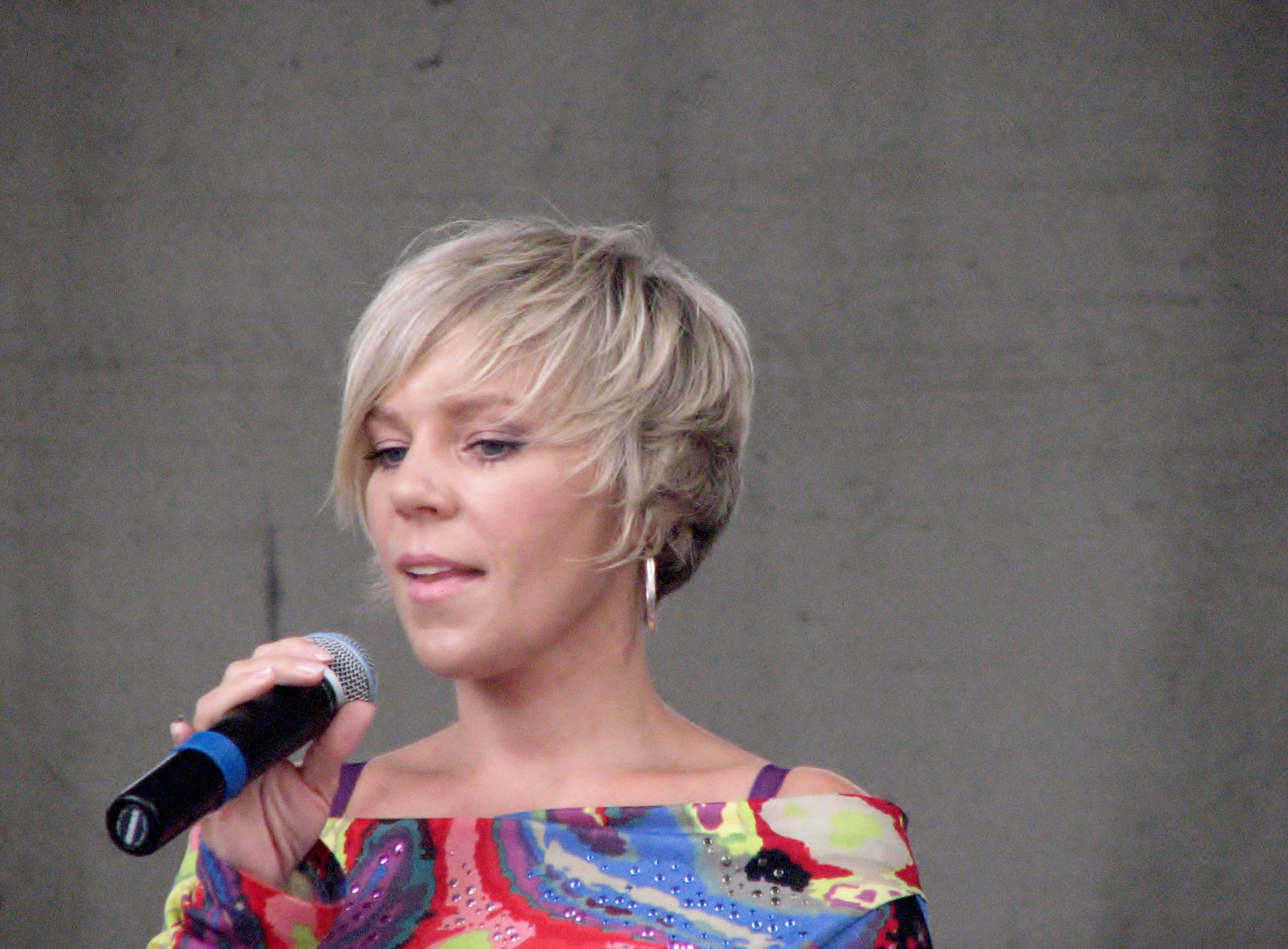 Gerli Padar esinemas Vaba Rahva Laulul Kuressaare lossihoovis